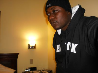 La photo du réalisateur Mamadi Indoka.